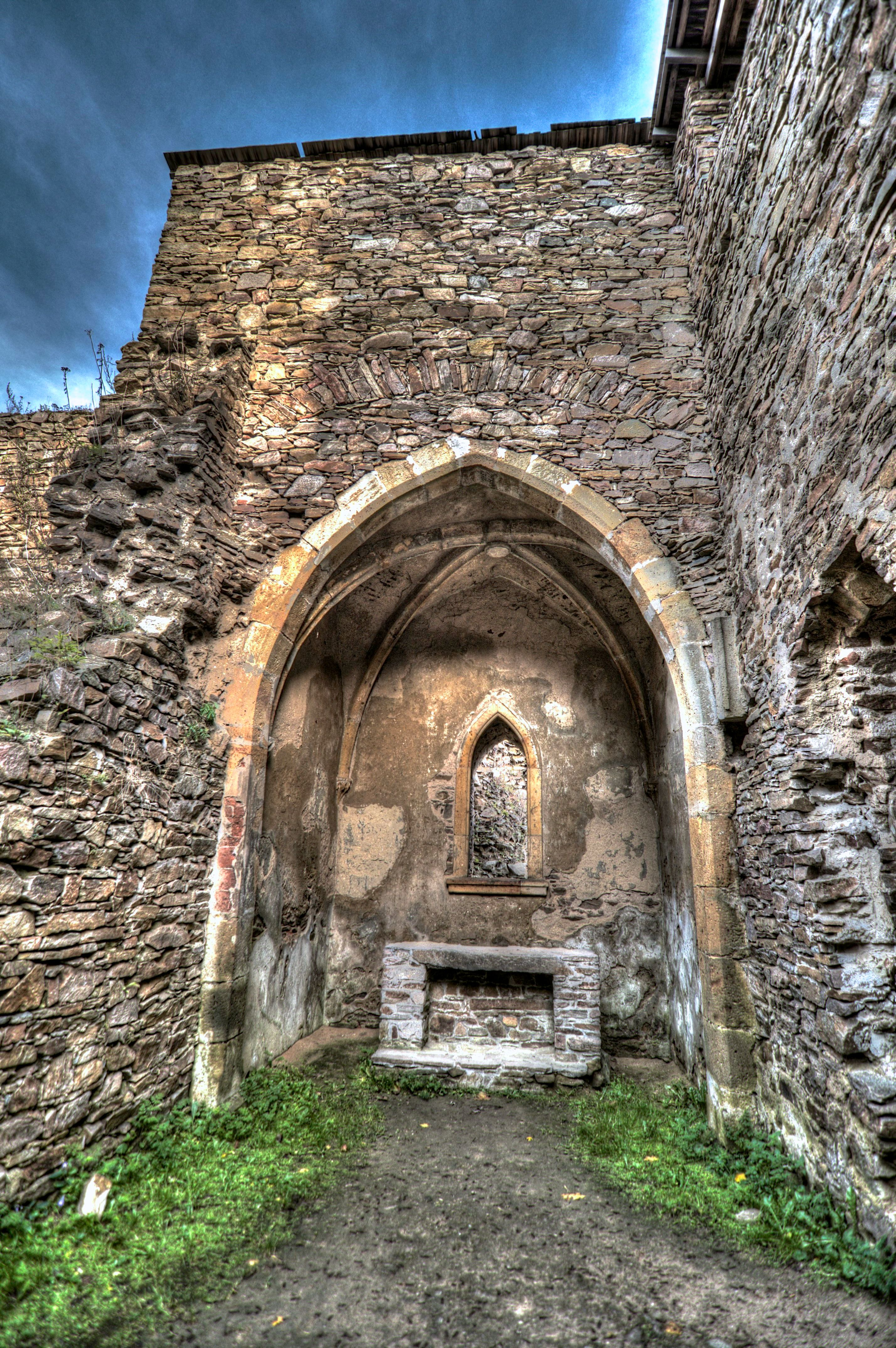 Hrad Hasištejn, parc. 657, 658, 831, Místo.